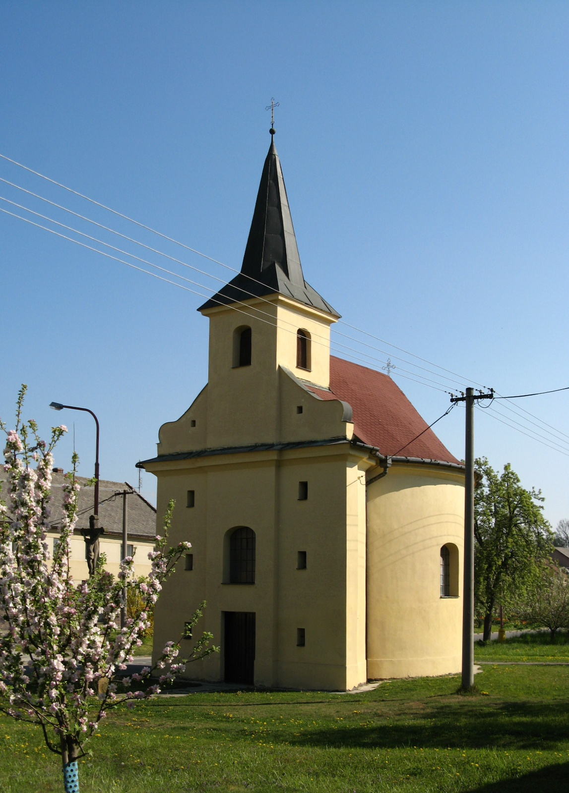 Kaple sv. Floriána (Štětovice), náves, Štětovice